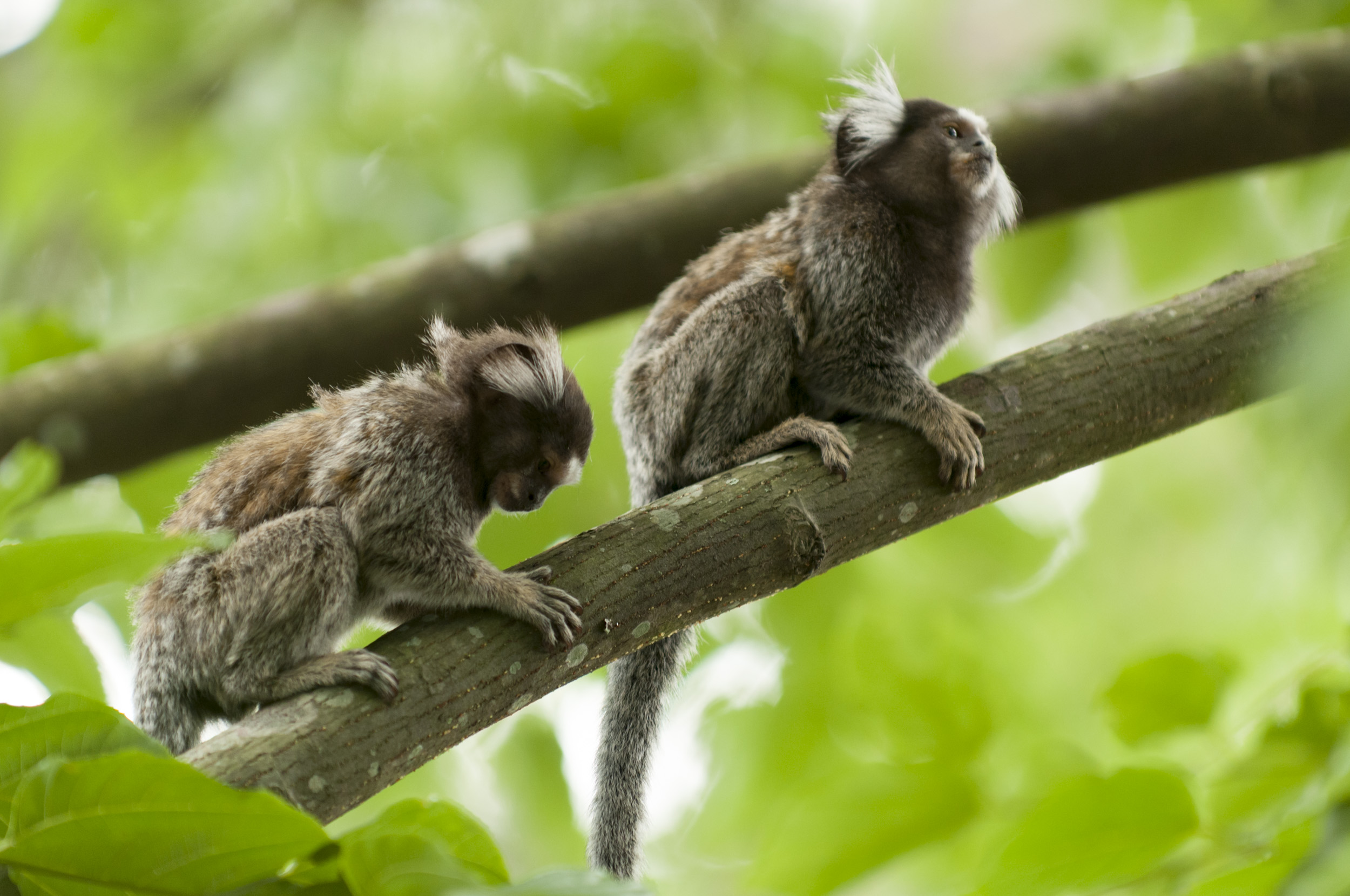 Animais da Serra da Cantareira - mico sagui